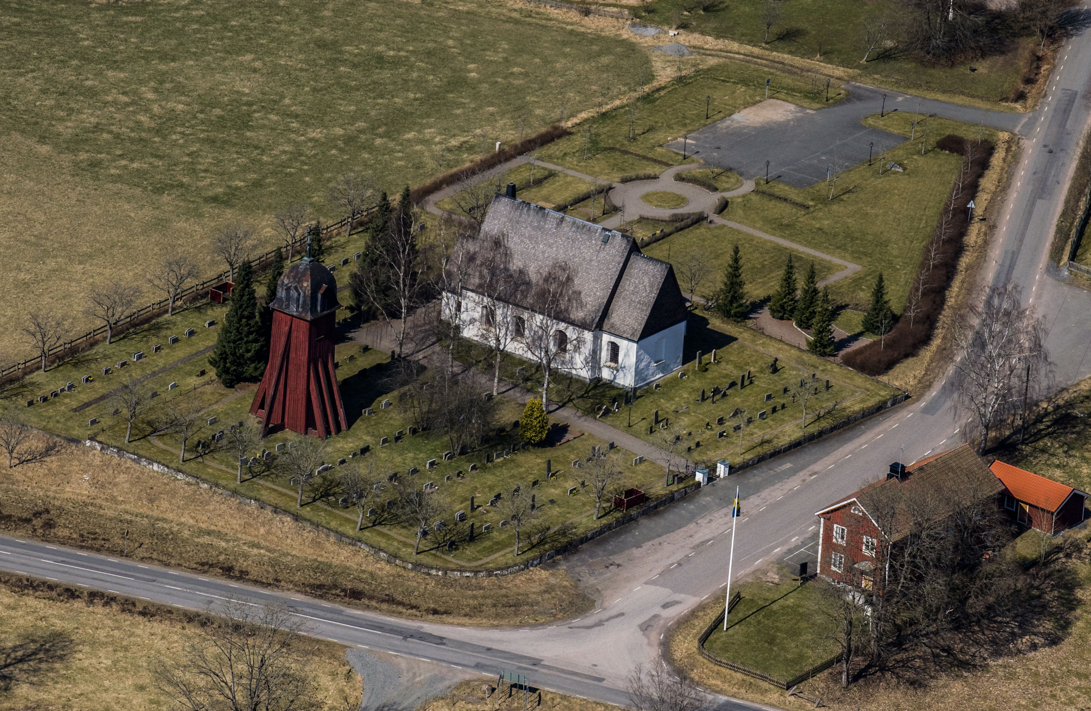 Hagshults ka